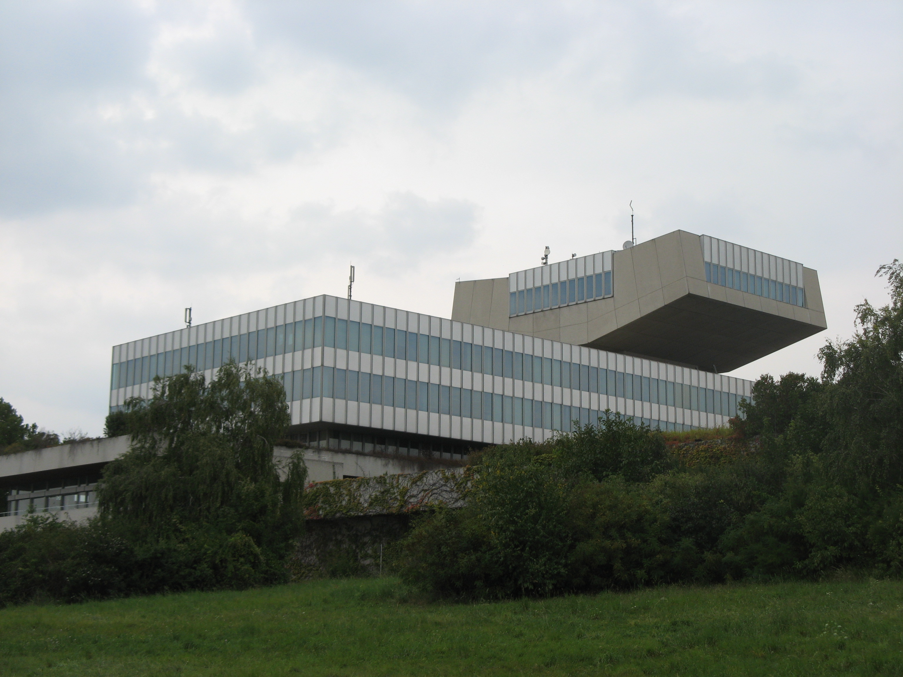 Büro- und Verwaltungsgebäude der Austrian Airlines (1975-78) von Georg Lippert, Fontanastraße, Wien-Favoriten